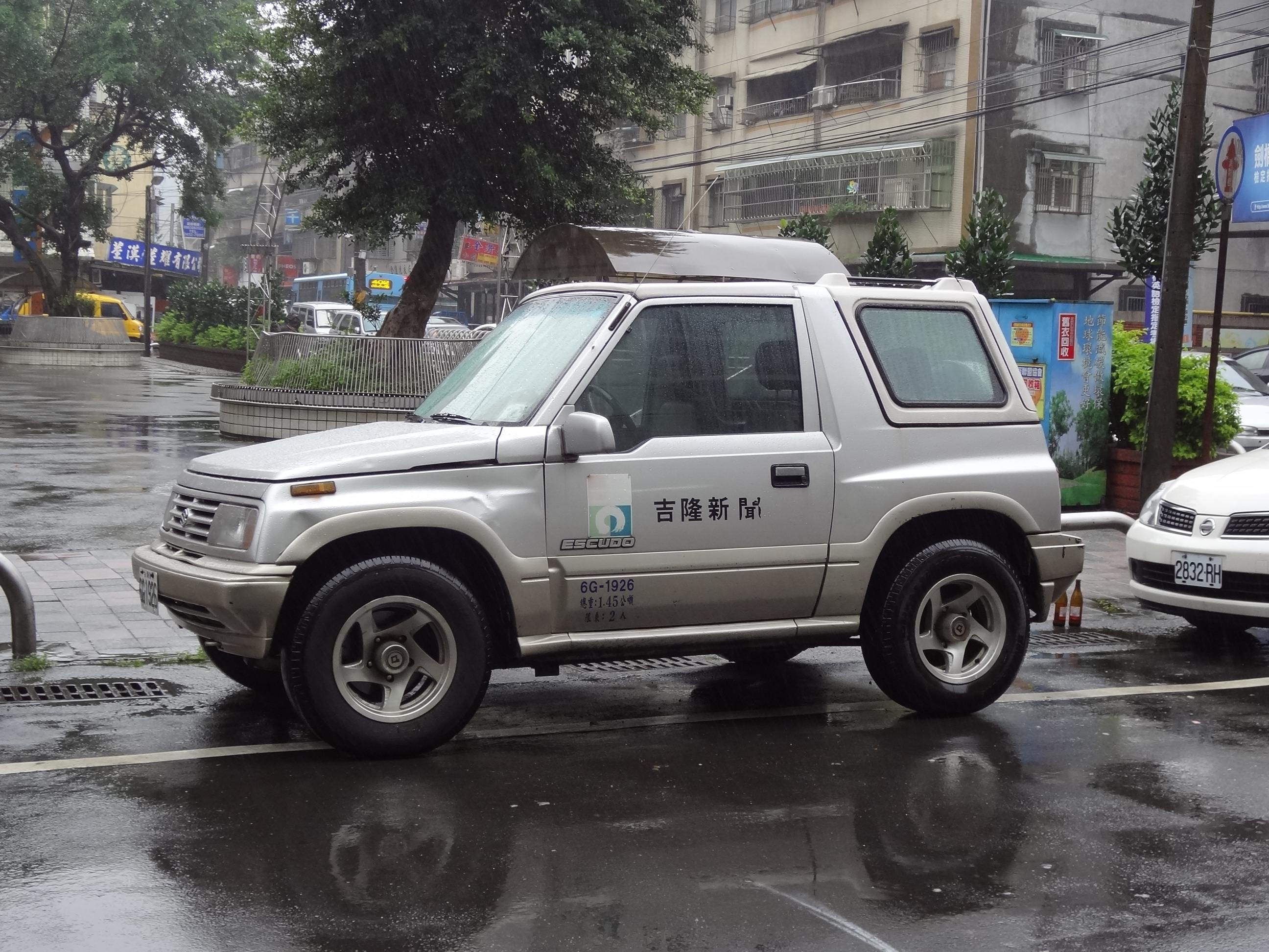 中文（台灣）: 吉隆有線電視新聞部鈴木吉星採訪車6G-1926，雨中停靠基隆市七堵區百五街，車門貼吉隆有線電視第一代商標貼紙。